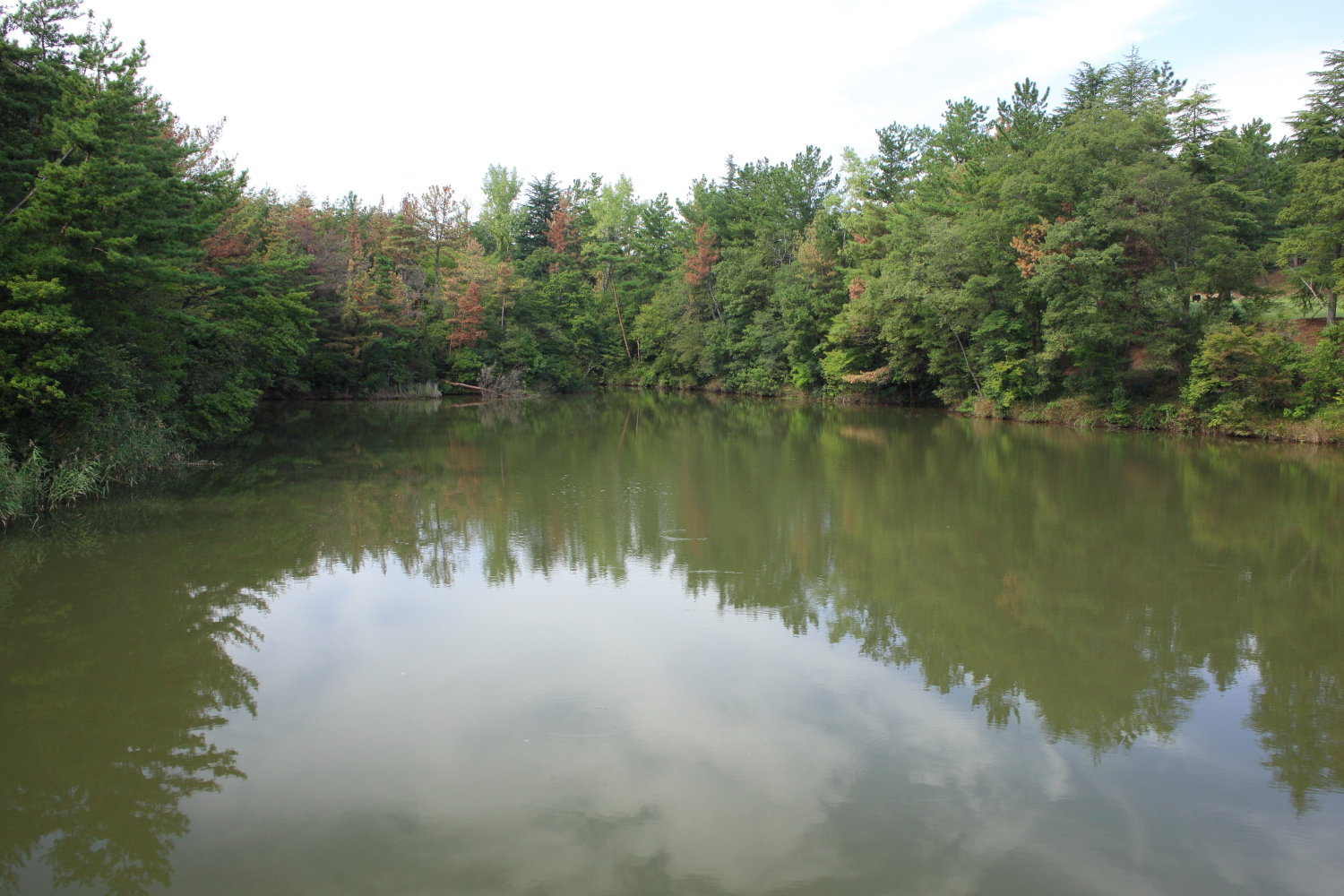 長田池（みよし市黒笹町、2013年）